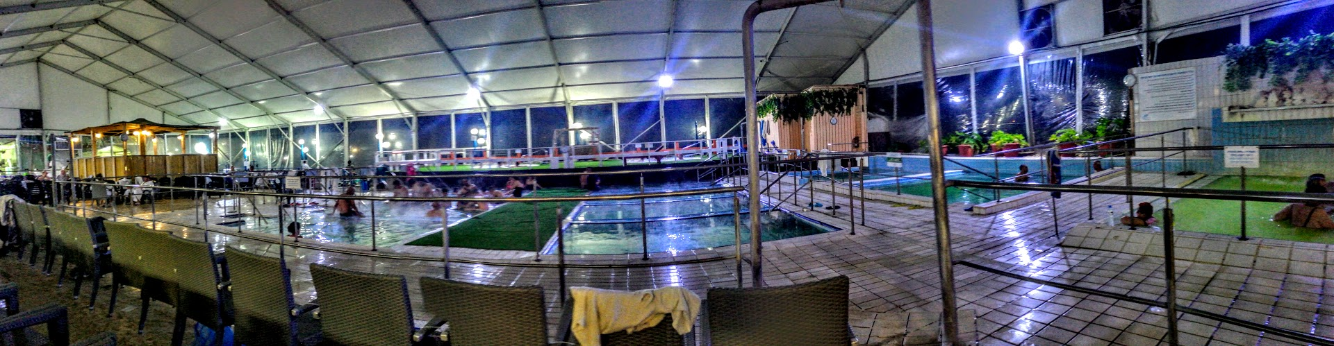 מרחצאות חמי יואב